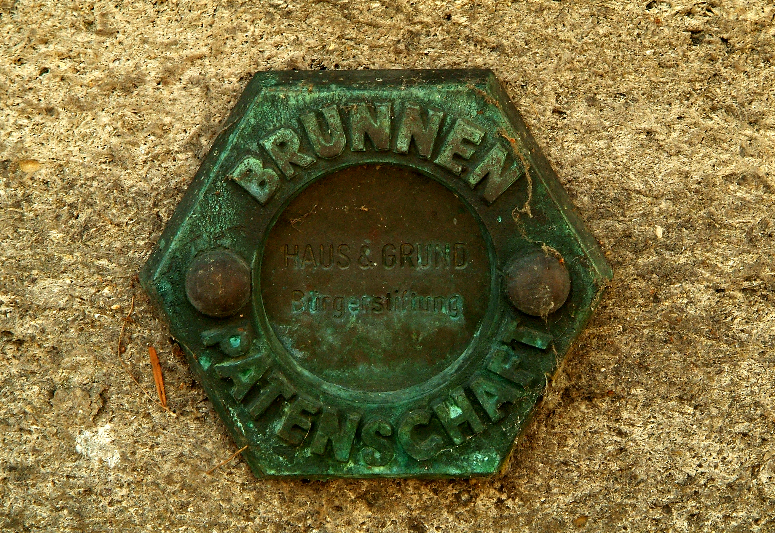 Die Bürgerstiftung Haus & Grundeigentum Hannover hat erkennbar eine Patenschaft für den Struckmeyer-Brunnen übernommen ...